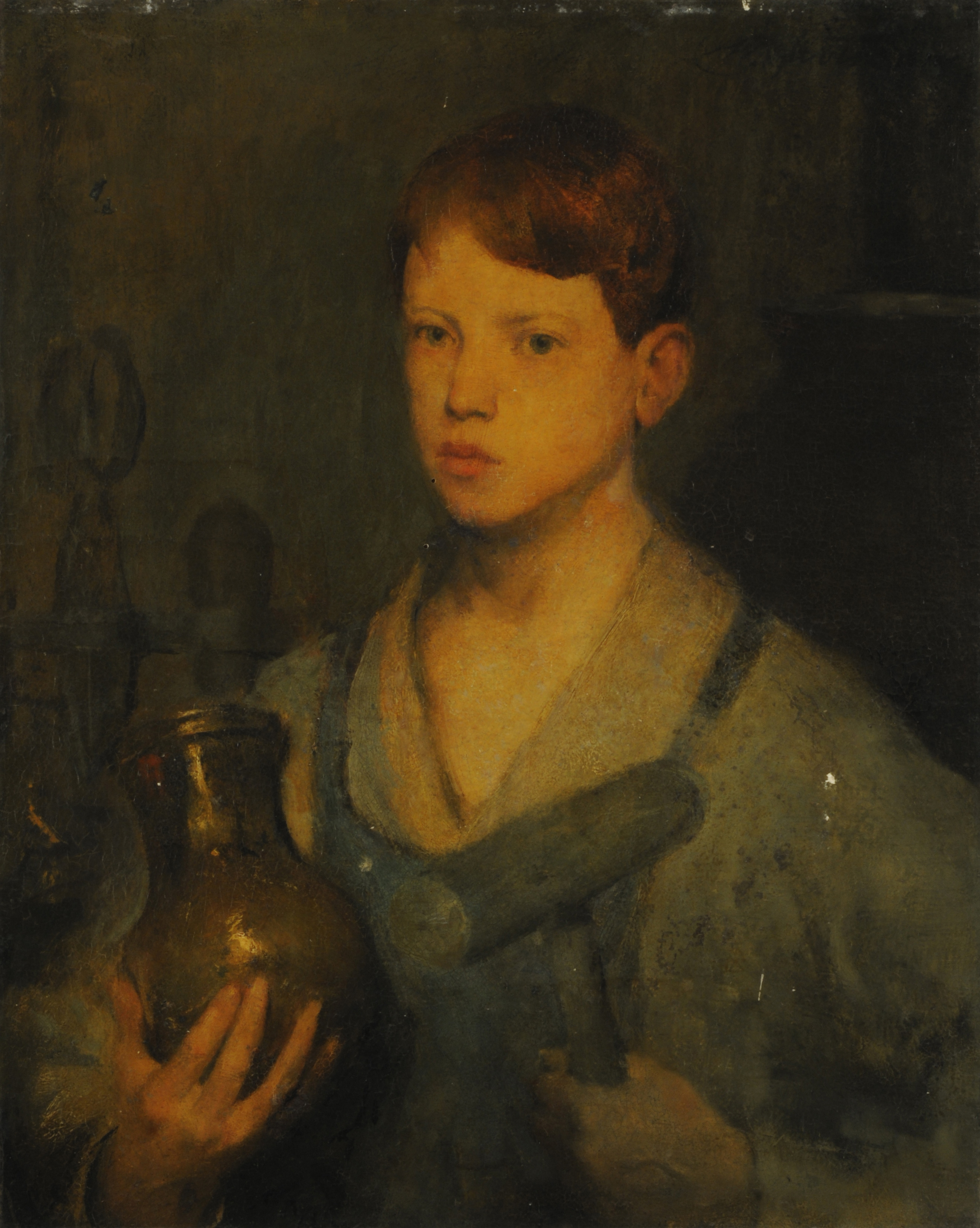 El aprendiz.